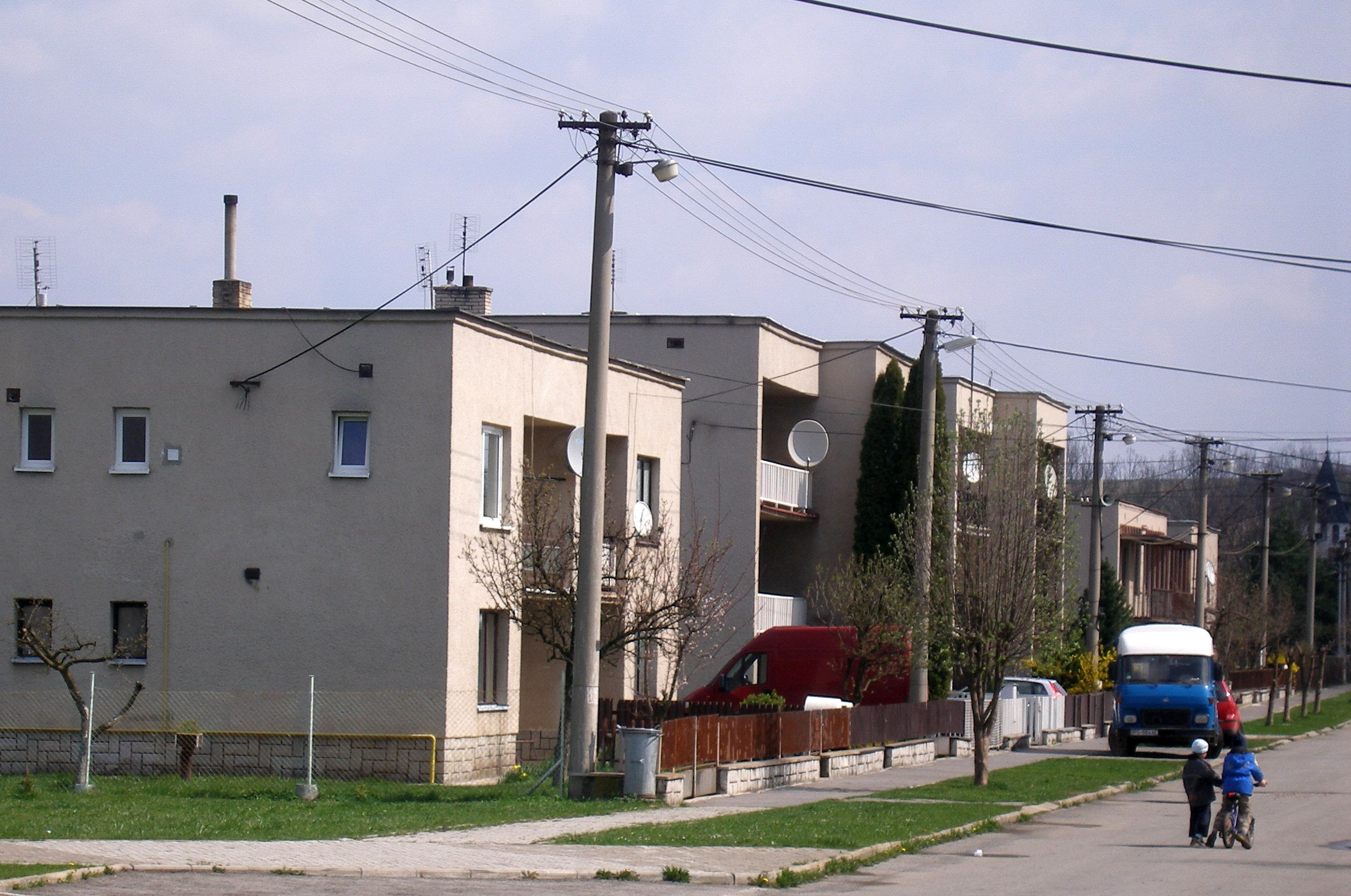 Obec Lada okres Prešov, región Šariš